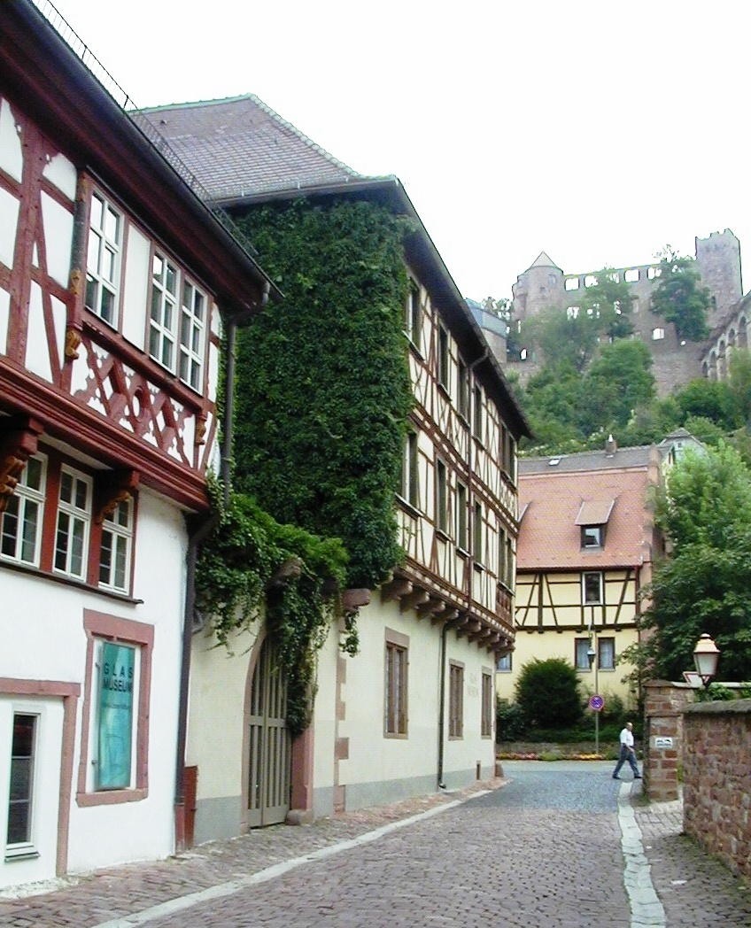 Glasmuseum Wertheim, Deutschland, Main-Tauberkreis, Gründung 1976, Blick vom Museum aus auf die Burg.